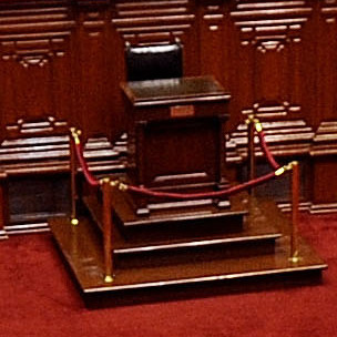 El Pleno del Congreso inició hoy, a las 9 y 15, su sesión matutina correspondiente a la fecha a fin de tratar temas considerados de sumo interés nacional y debidamente acordados por la Junta de Portavoces. Se guardó un minuto de silencio en memoria de la hija del congresista Juan Pari Choquecota, recientemente fallecida. También, en homenaje póstumo al suboficial PNP John Wilder Vásquez, asesinado en un reciente asalto a una agencia bancaria en Ate-Vitarte.